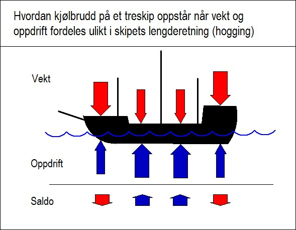 Hvordan kjølbrudd oppstår ved hogging